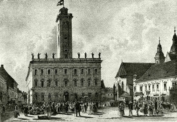 A régi városház Pesten. Építette Kasselik Ferenc 1842-ben. Kőnyomat Rudolf Alt rajza után. 1845-ből